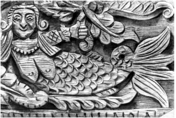 Фараонка (морская дева, русалка). Резьба по дереву, Поволжье, XIX век.